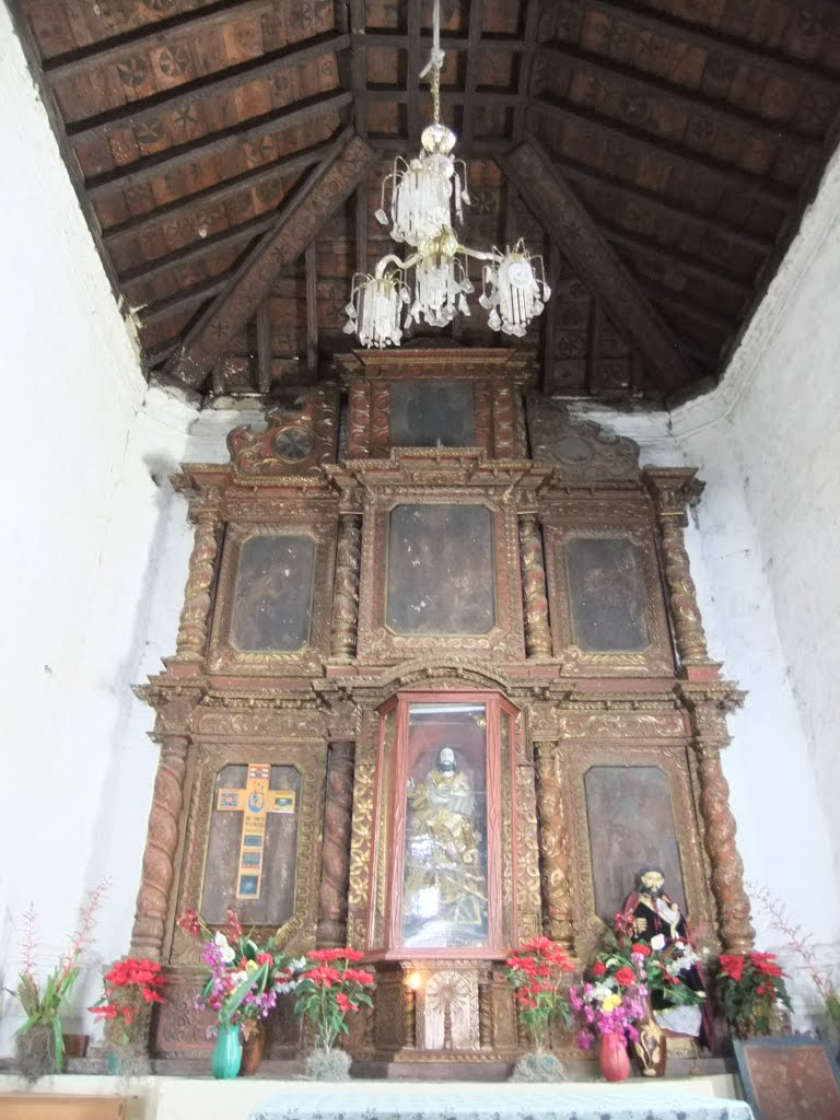 Retablo de la Iglesia de San Bartolomé Jocotenango